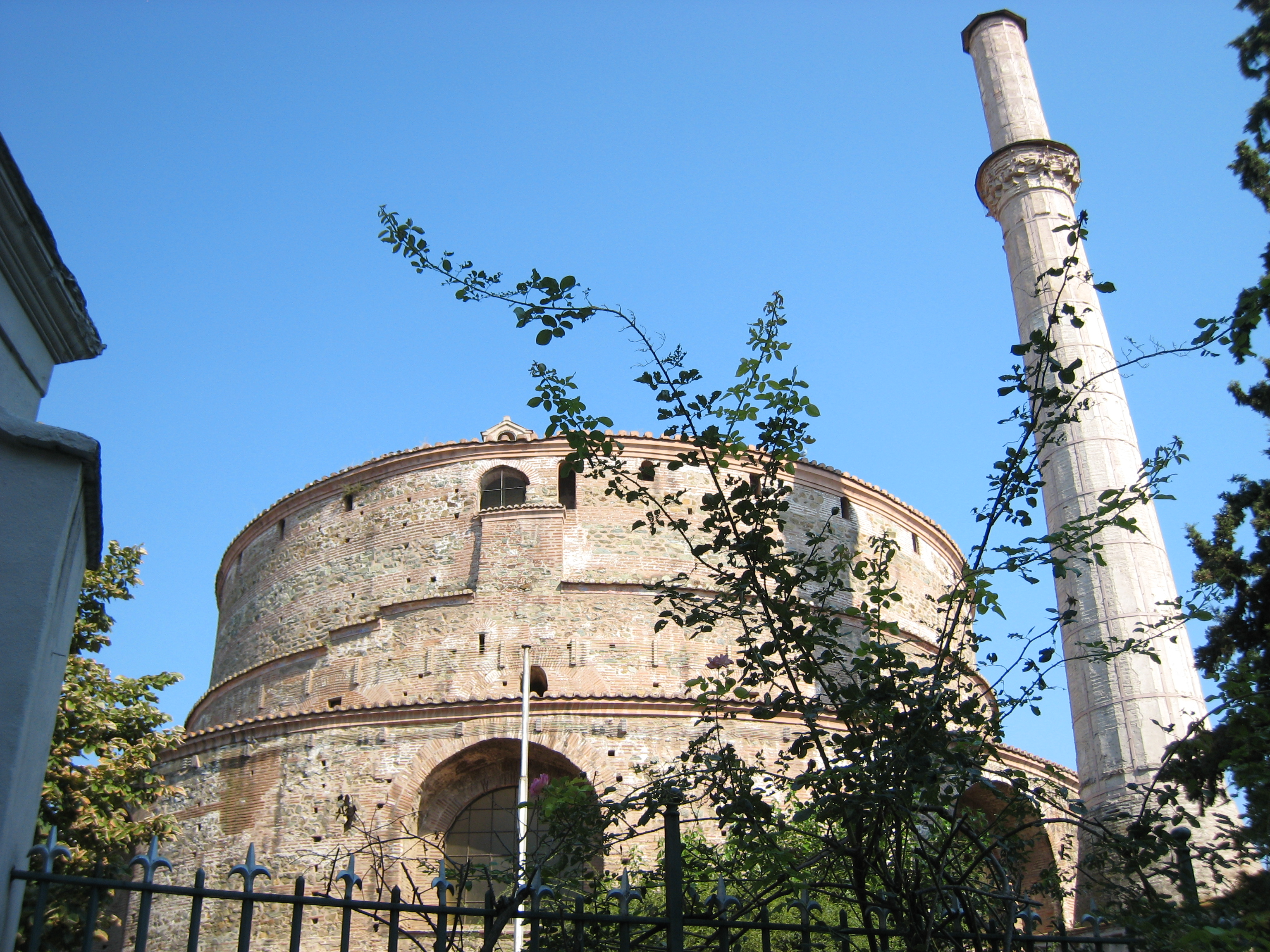 Cathédrale Saint-Georges et l'ancien minaret.